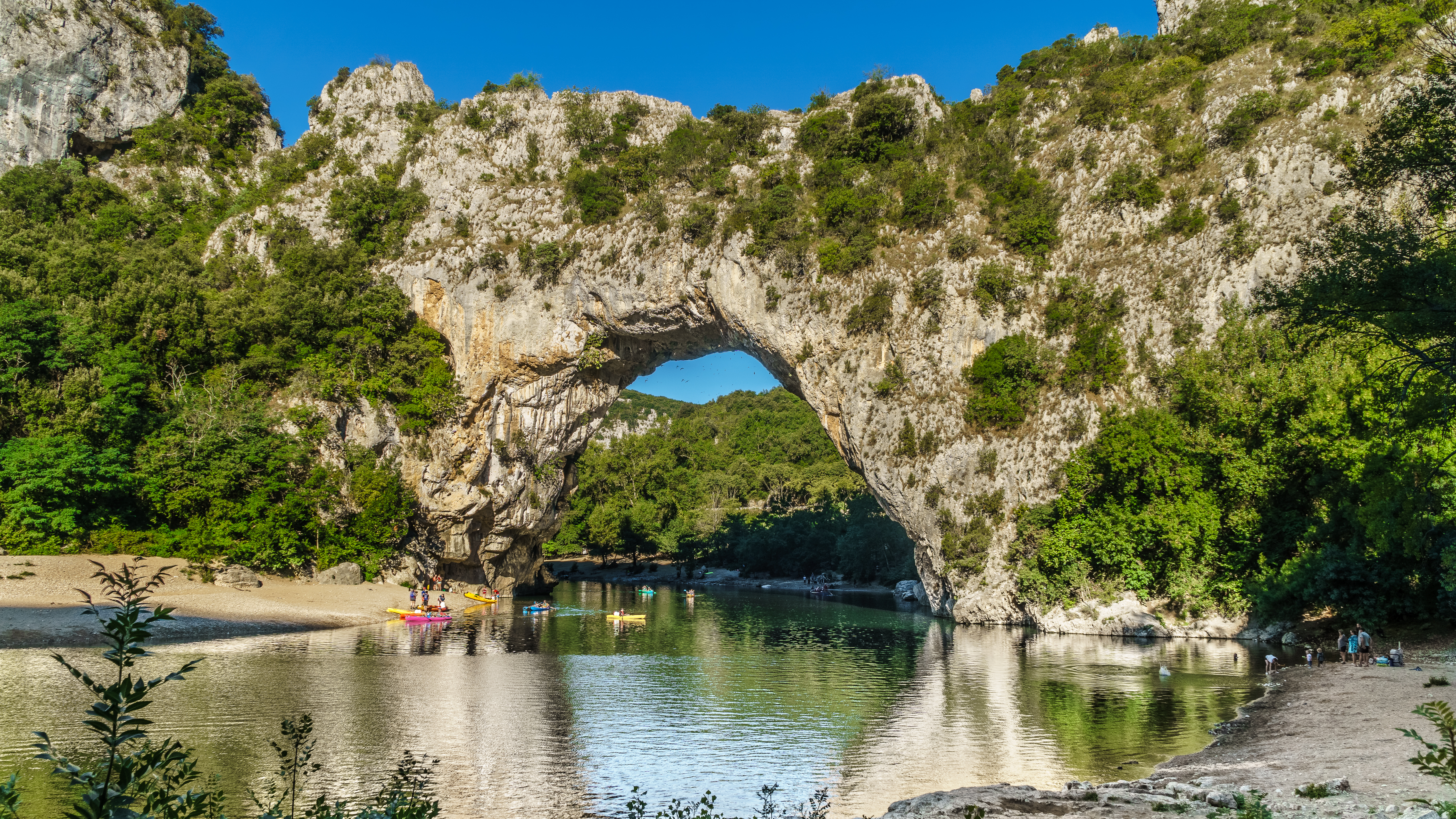 vue en amont du Pont d'Arche.